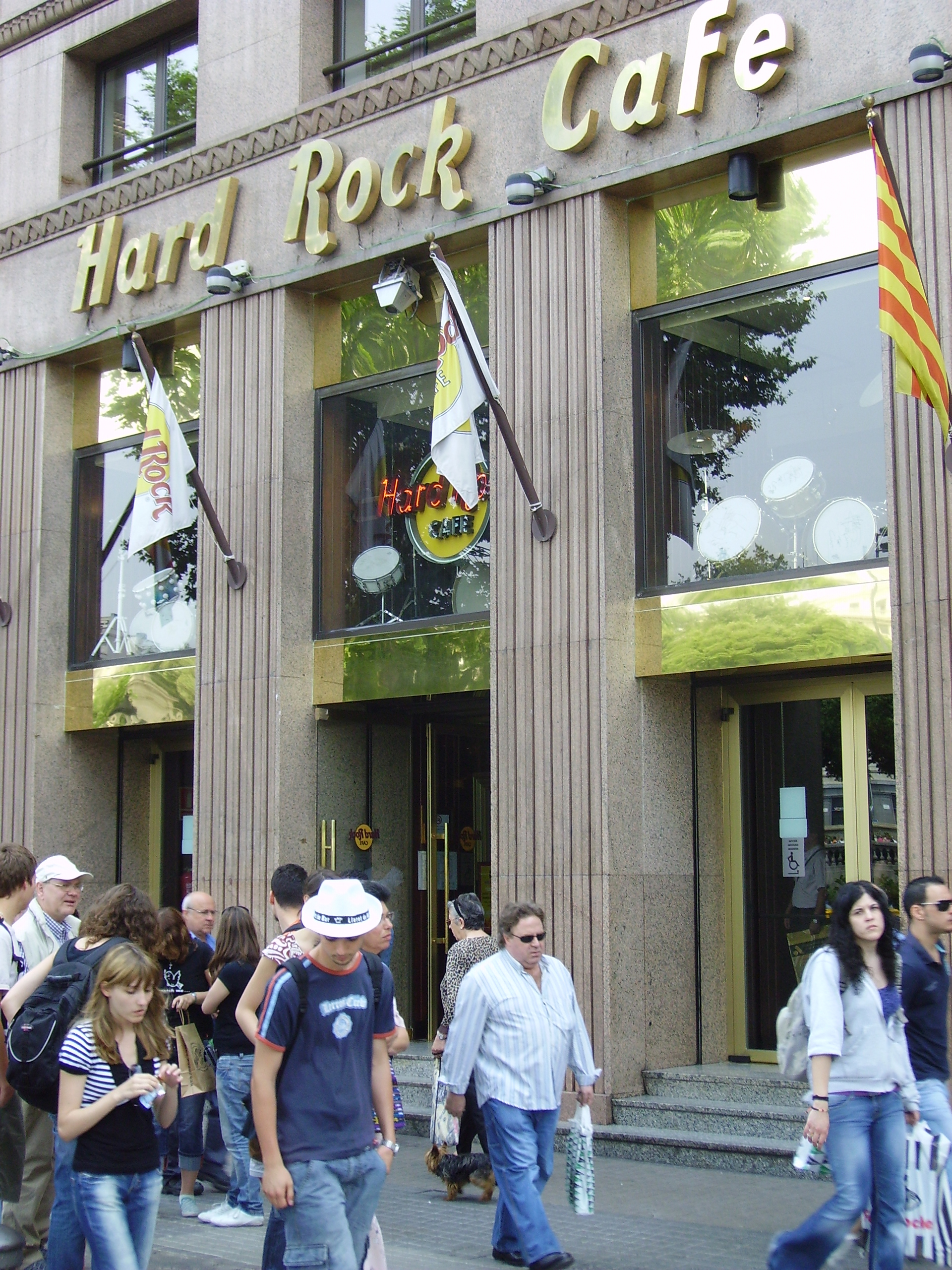 Hard Rock Cafe a la Plaça Catalunya, Barcelona, Catalunya.